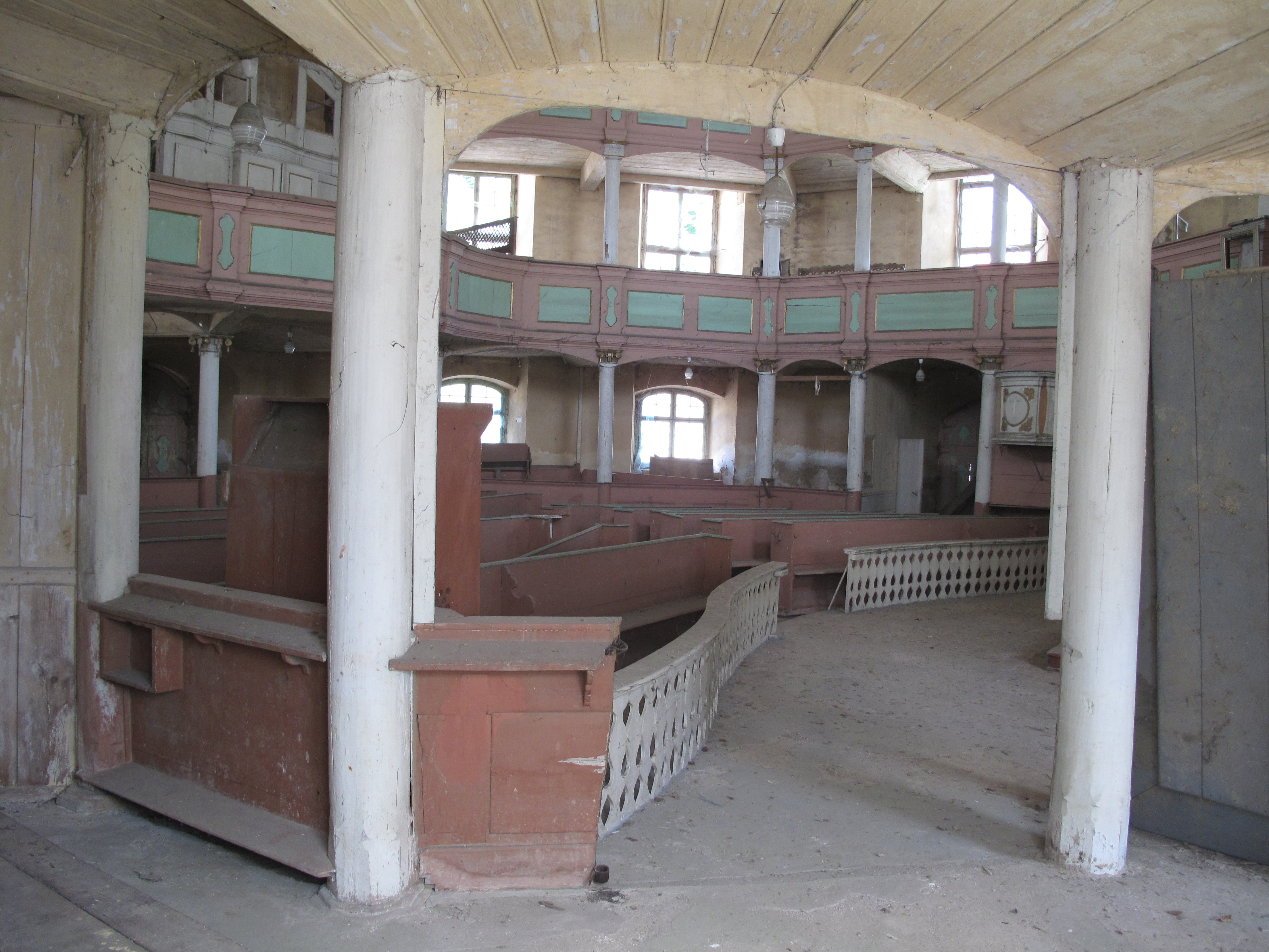 Komarno (województwo dolnośląskie). Polska.